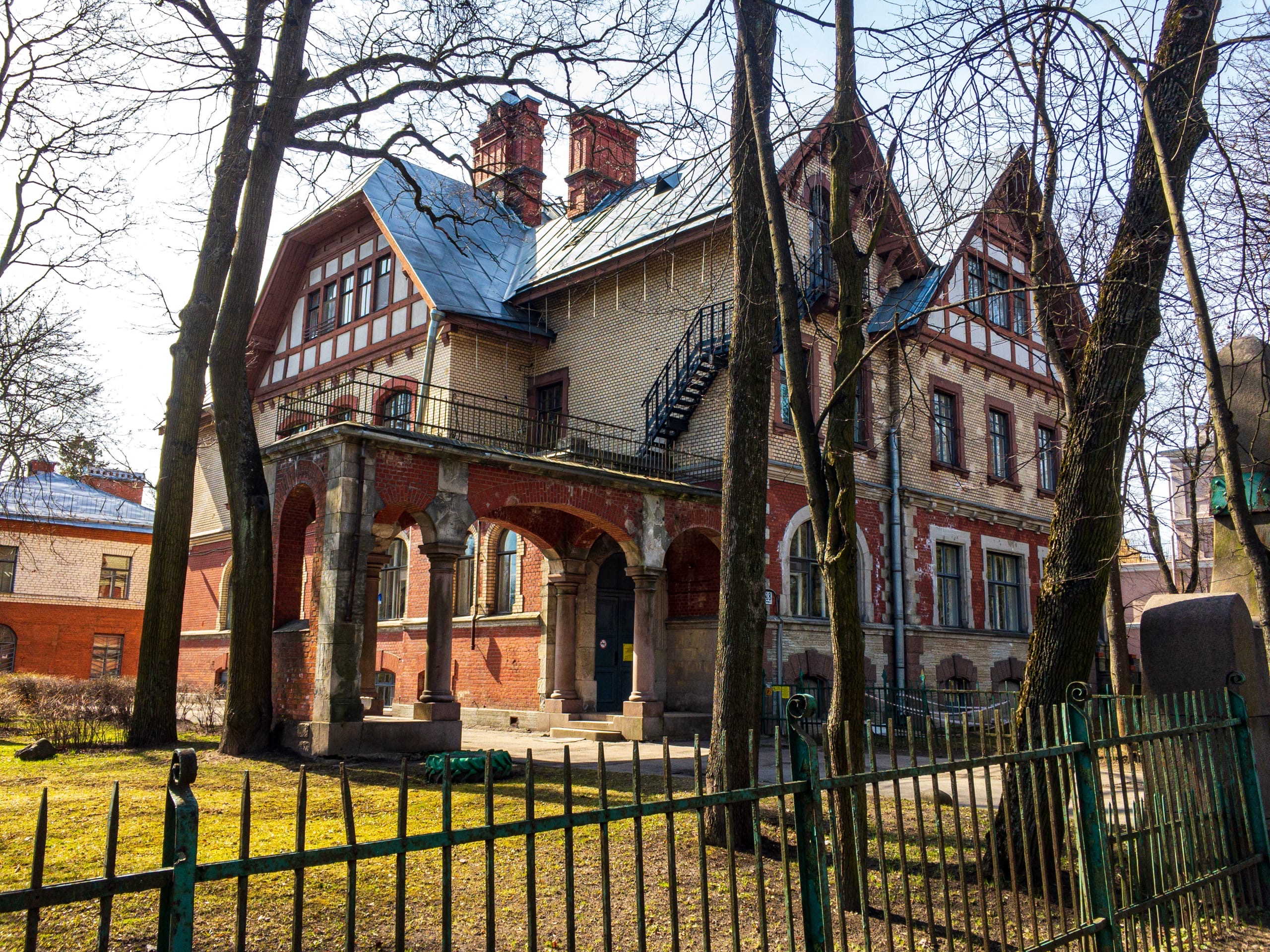 Дом Гудовича, модерн, Данини